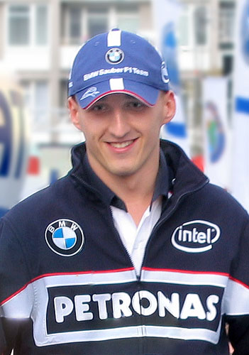 Robert Kubica in Warsaw, September 2006